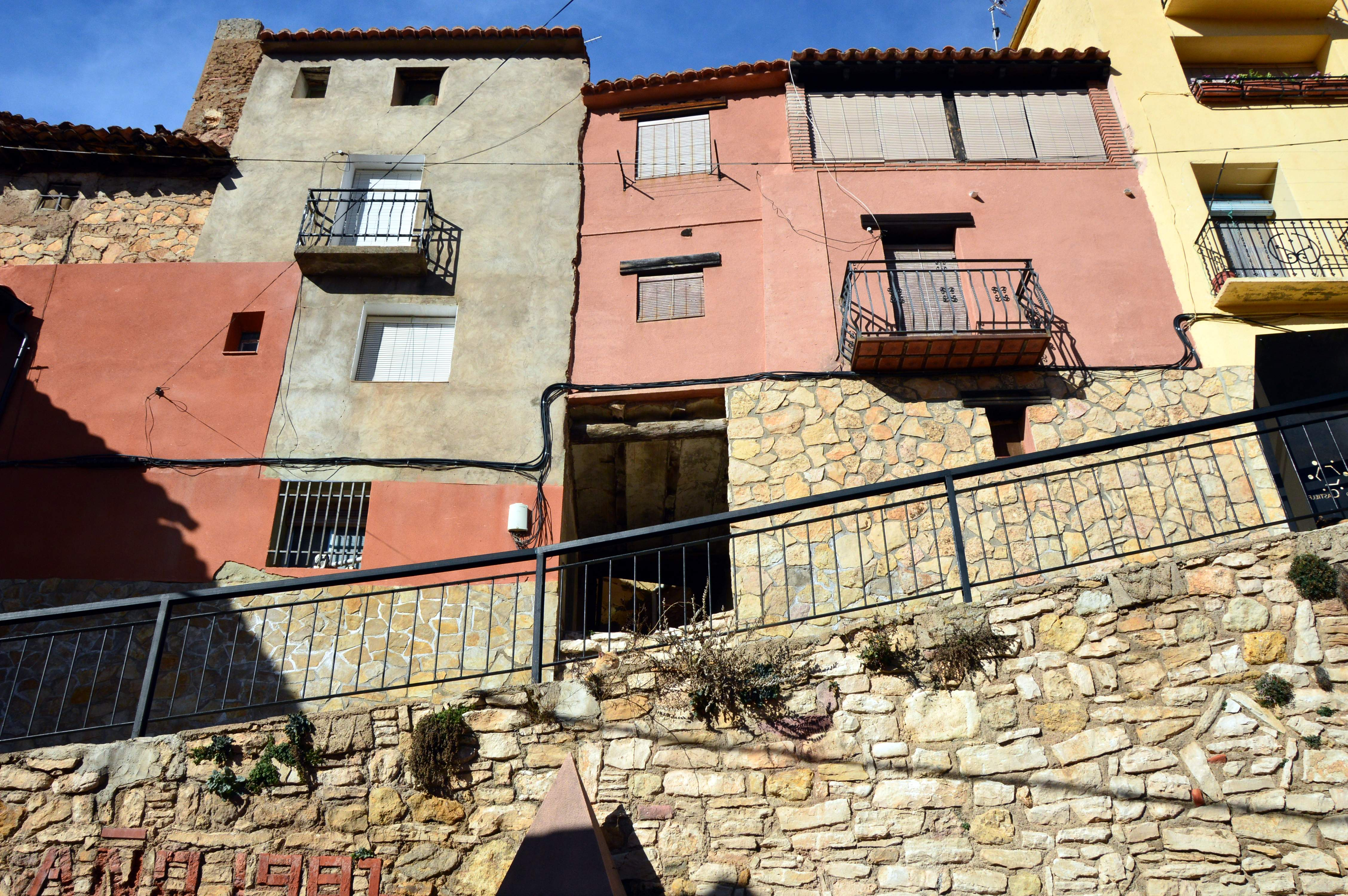 Paisaje urbano de Castielfabib (Valencia), correspondiente al paño de muralla de la calle La Fuente (2019).